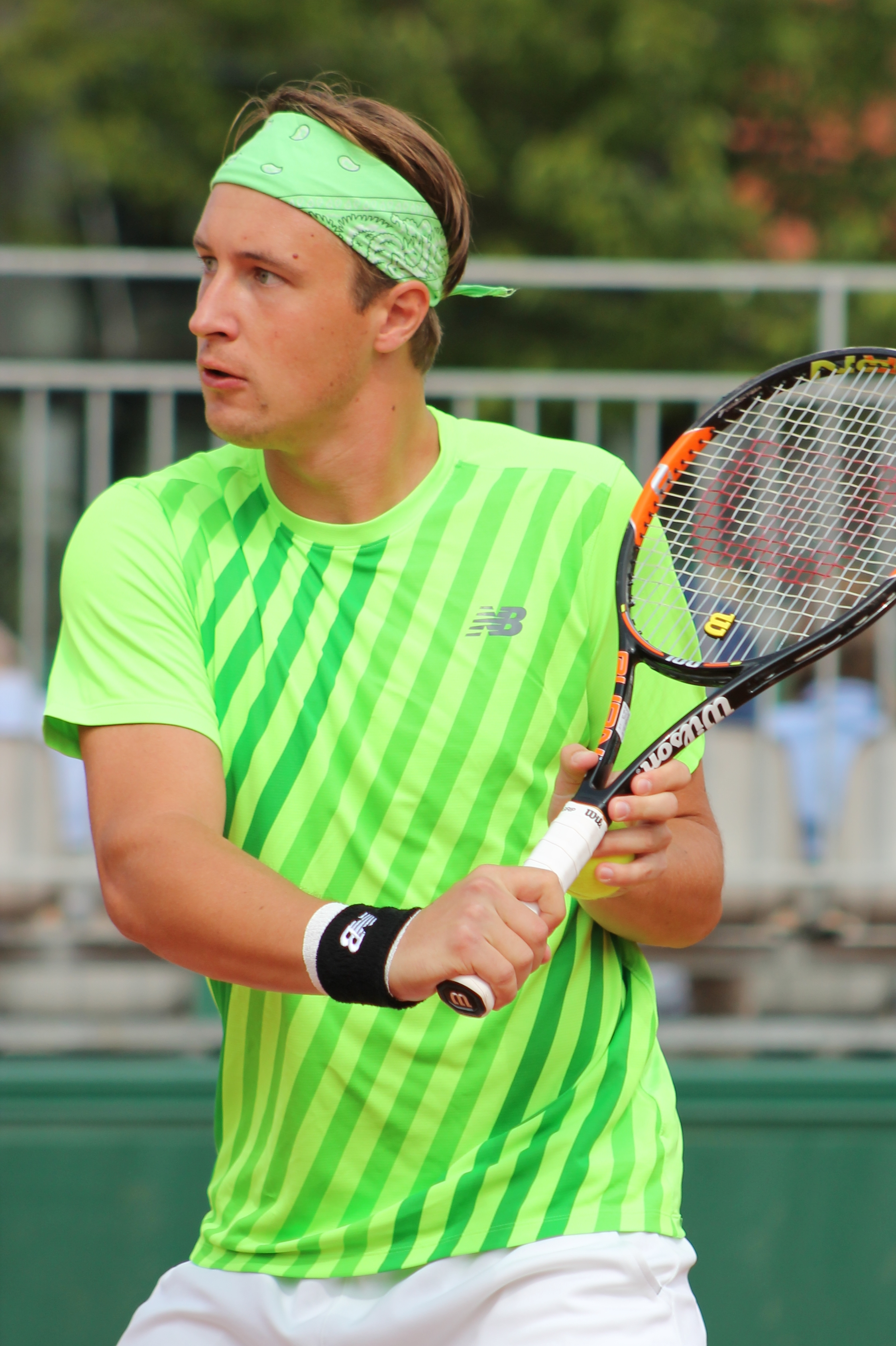 Kontinen RG15 (3)